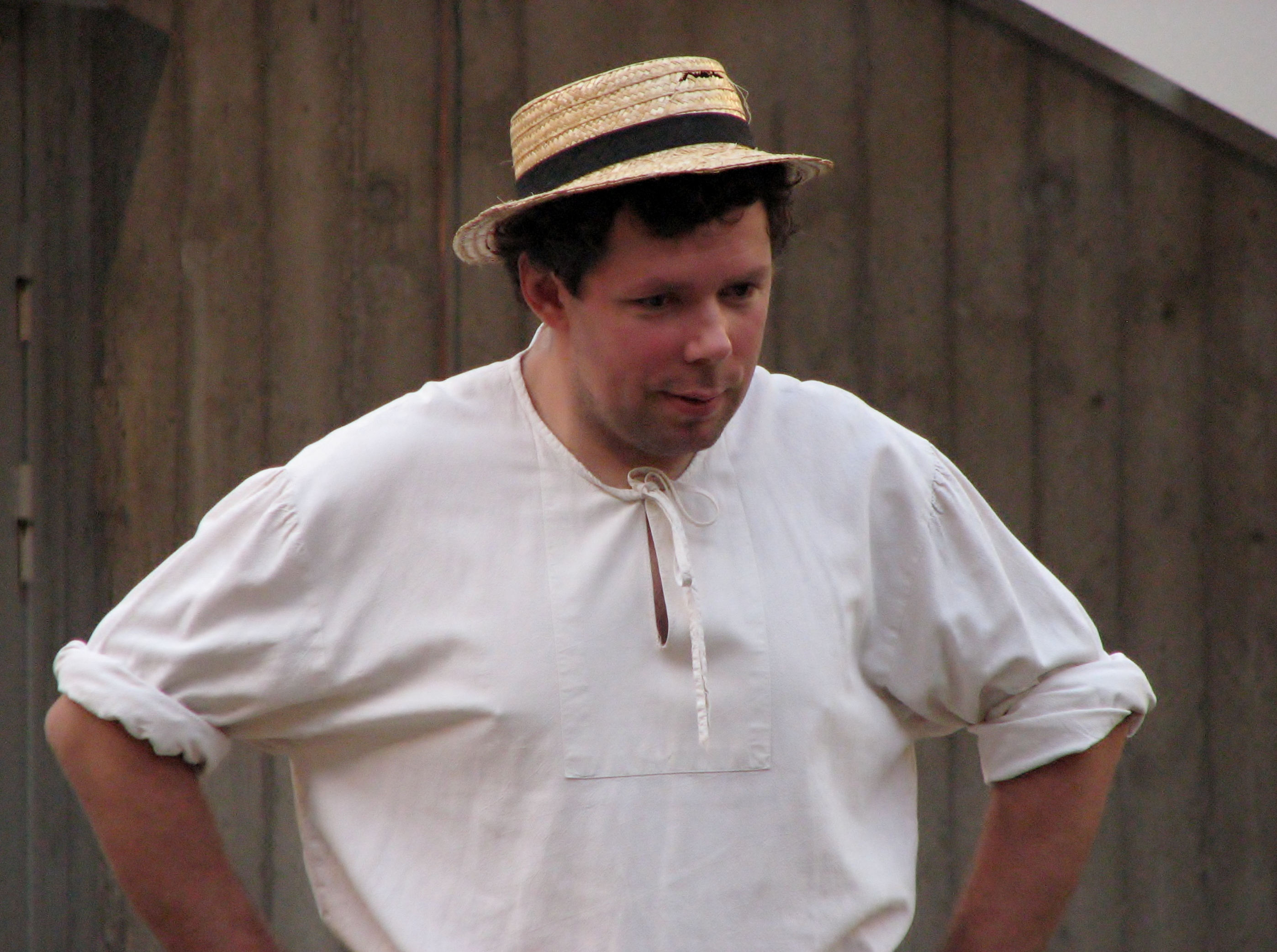 Mart Toome Tallinna Linnateatri 48. hooaja avamisel